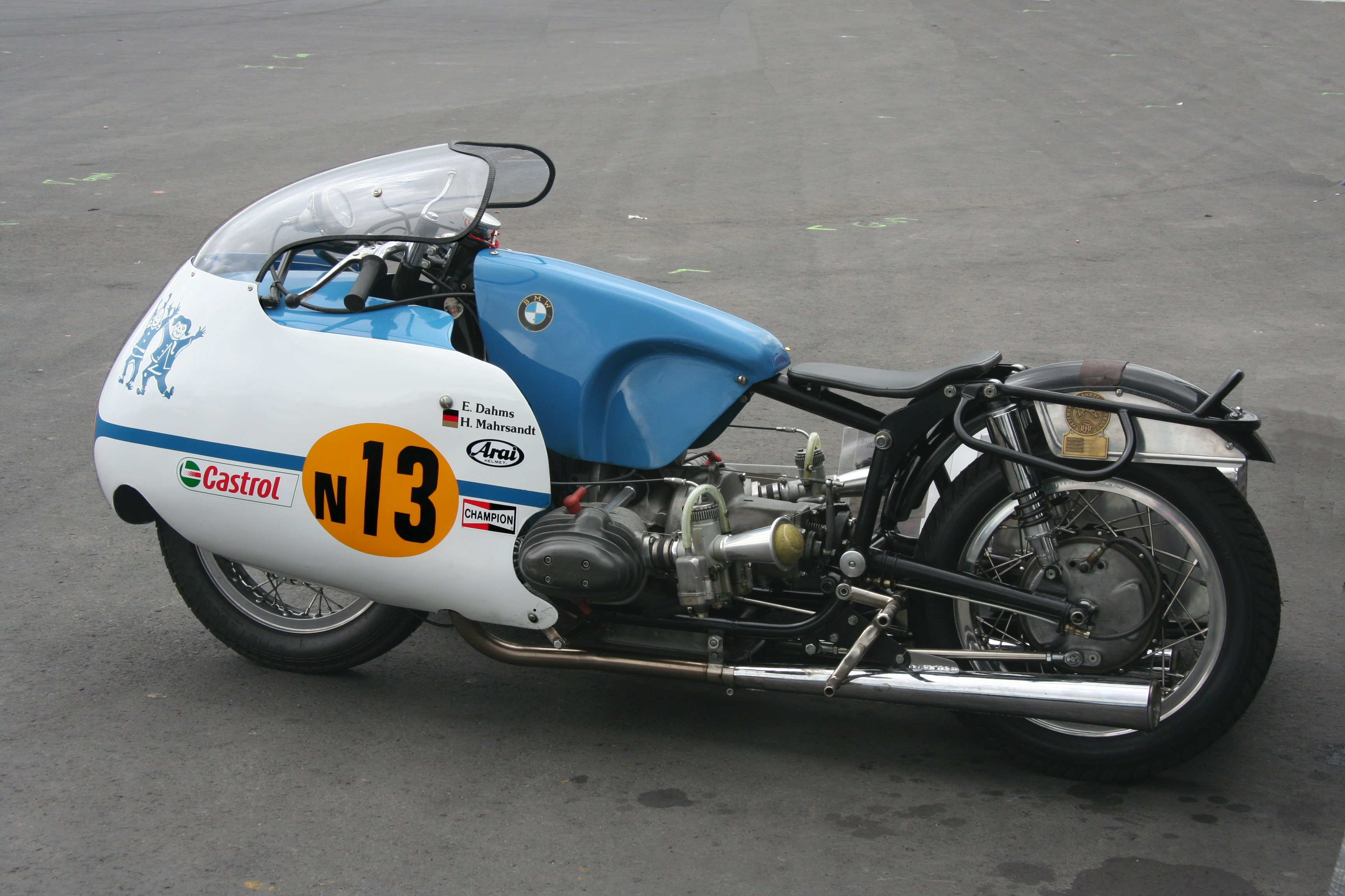 Replikat der BMW RS 54 von Max Deubel/Emil Hörner aus den Jahren 1961 bis 1965, aufgebaut von Ewald Dahms, der die Maschine bei Oldtimerveranstaltungen auch selbst fährt. Das Foto entstand beim Oldtimer Festival des DAMC im Fahrerlager des Nürburgrings.